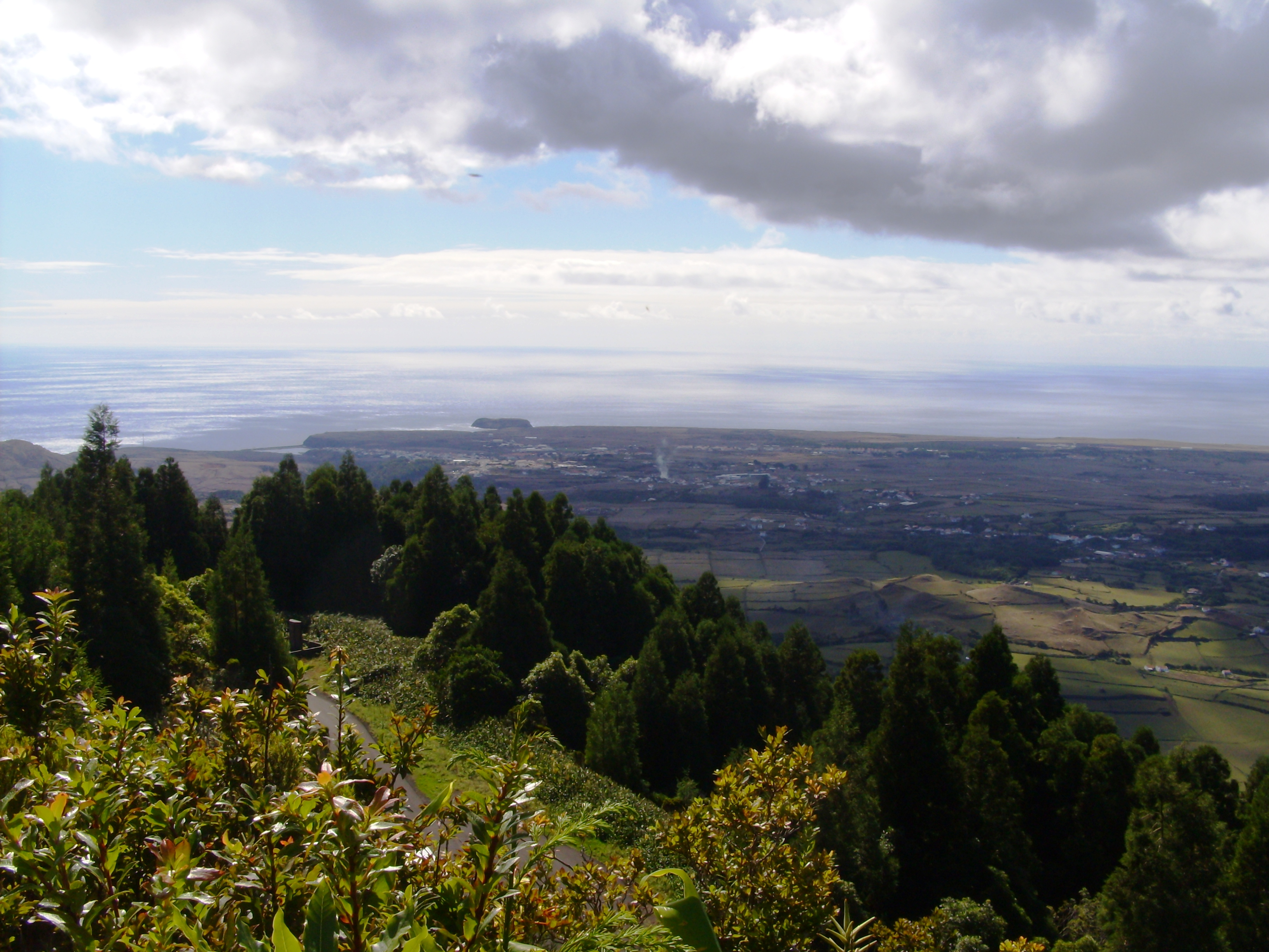 Pico Alto, concelho de Vila do Porto, ilha de Santa Maria, Açores: vista panorâmica sobre a ilha. Ao fundo, Vila do Porto.